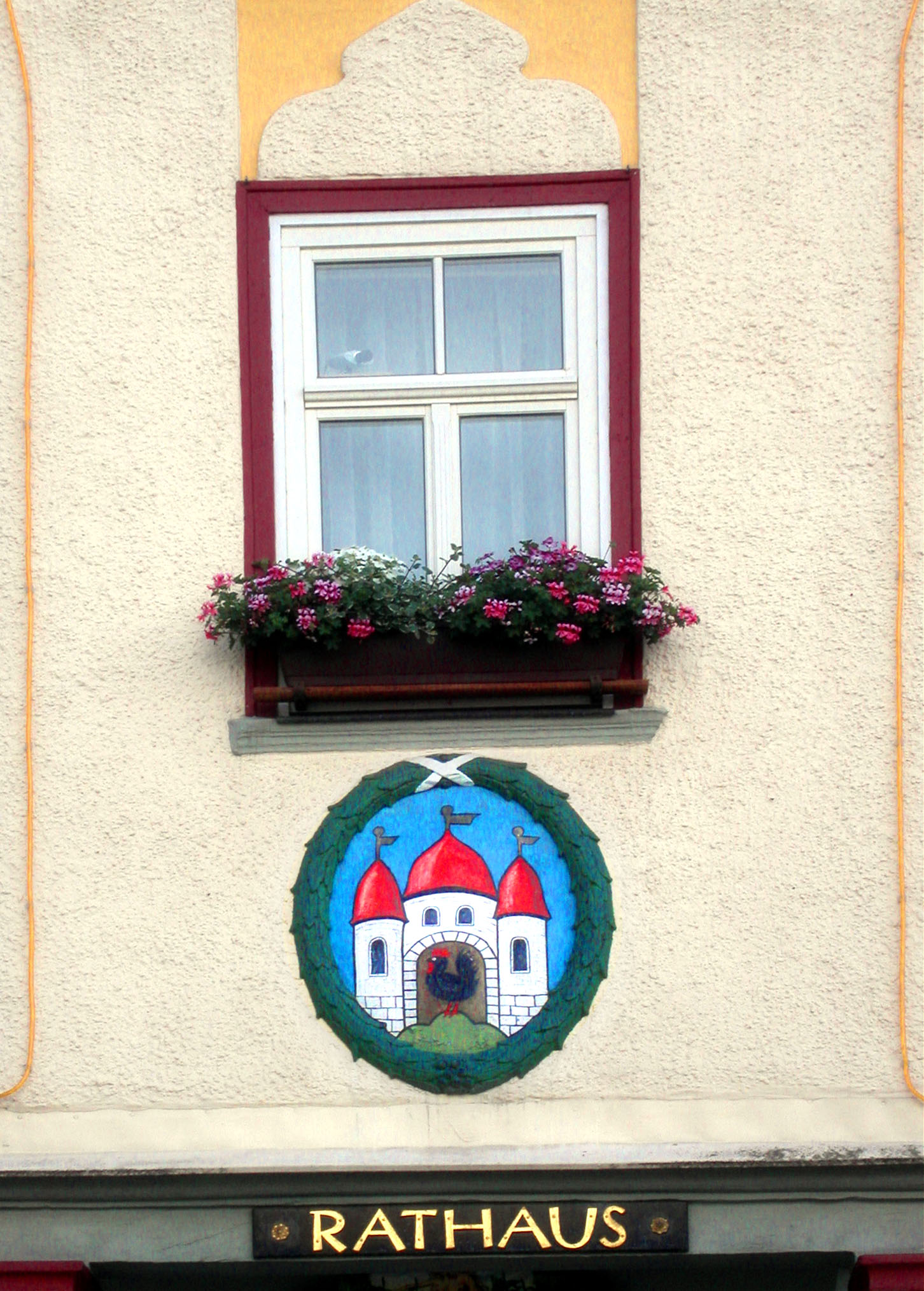 Schleusingen, Stadtwappen am Rathaus